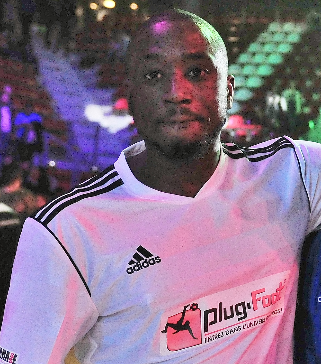 Photo de Mamadou Diakité prise le 23 décembre à la Kindarena de Rouen lors du Plug-Foot Allstars